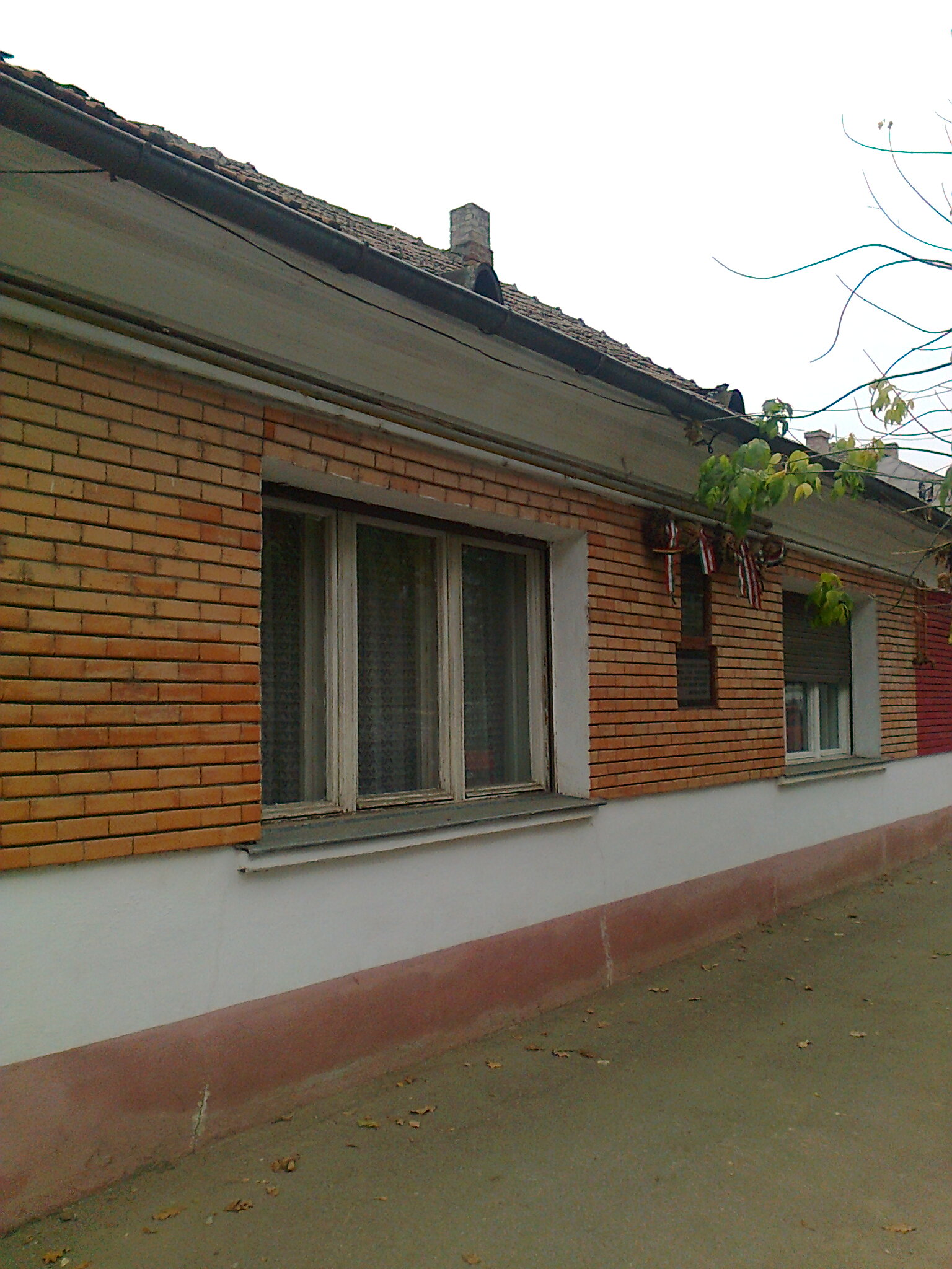 Horváth Imre költő szülőháza Margittán (Körtvélyesi, ma Balcescu utca 1.)